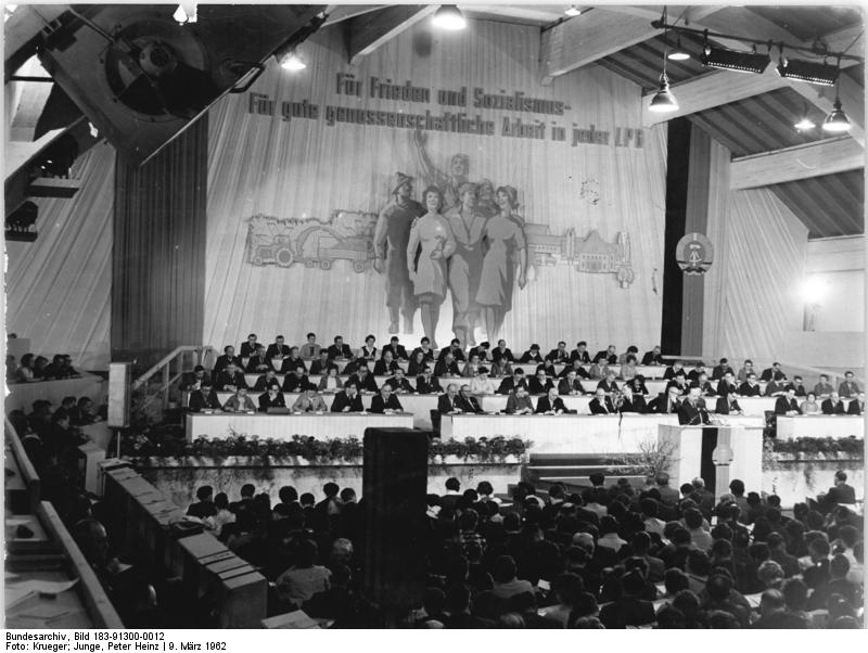 Zentralbild Krueger Junge Lb-Noa 9.3.1962 VII. Deutscher Bauernkongreß vom 9.-11.3.1962 in Magdeburg - Eröffnungstag - Der VII. Deutsche Bauernkongreß wurde am Freitag, dem 9. März 1962, um 8.30 Uhr in Anwesenheit des Vorsitzenden des Staatsrates und Ersten Sekretär des ZK der SED, Walter Ulbricht, in der festlich geschmückten Hermann-Gieseler-Sporthalle eröffnet. Rund 2000 Delegierte sowie etwa 200 Gäste des In- und Auslands nehmen daran teil. UBz: Blick auf die Delegierten während des Kongresses.